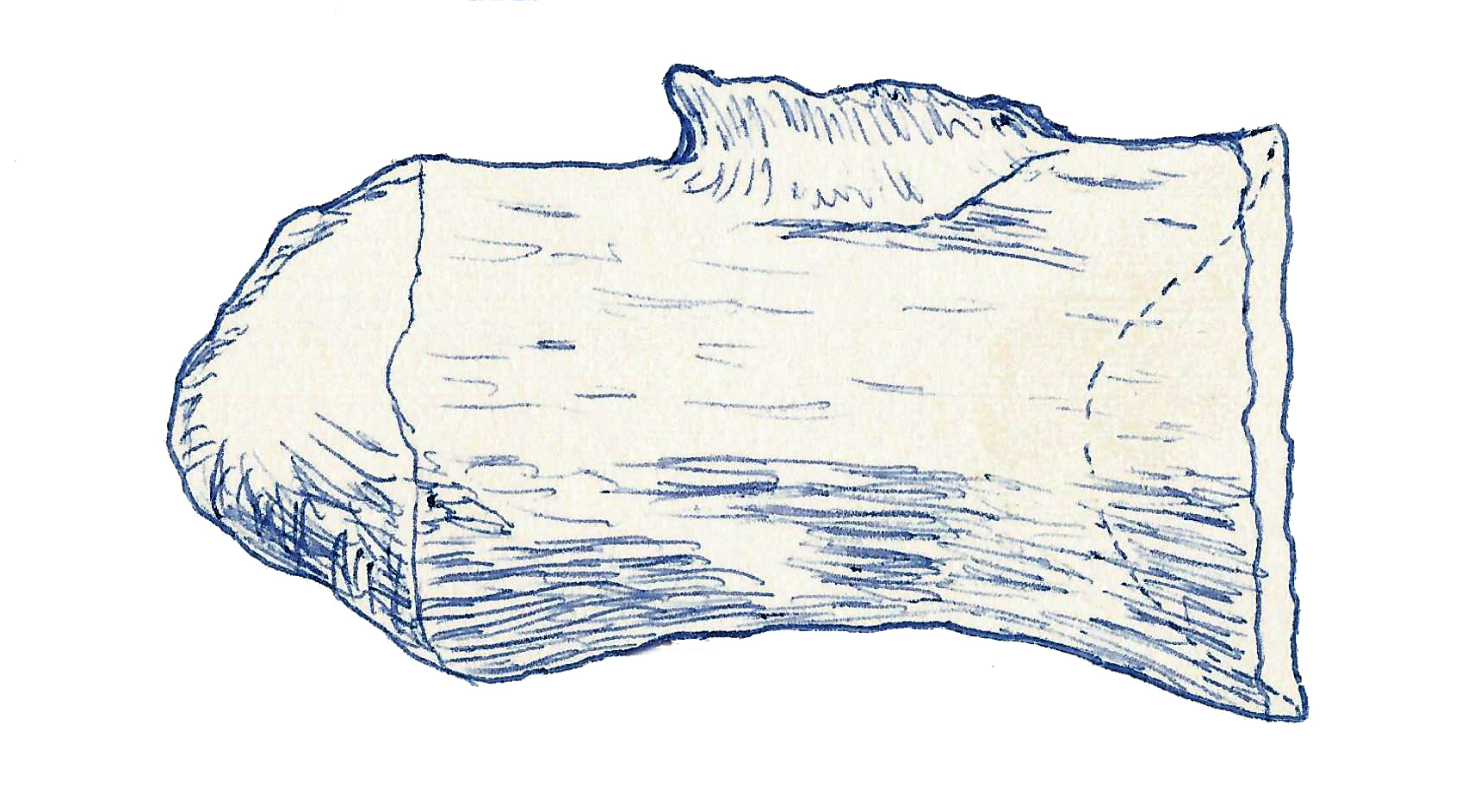 Illustration of a fossil of Macrurosaurus